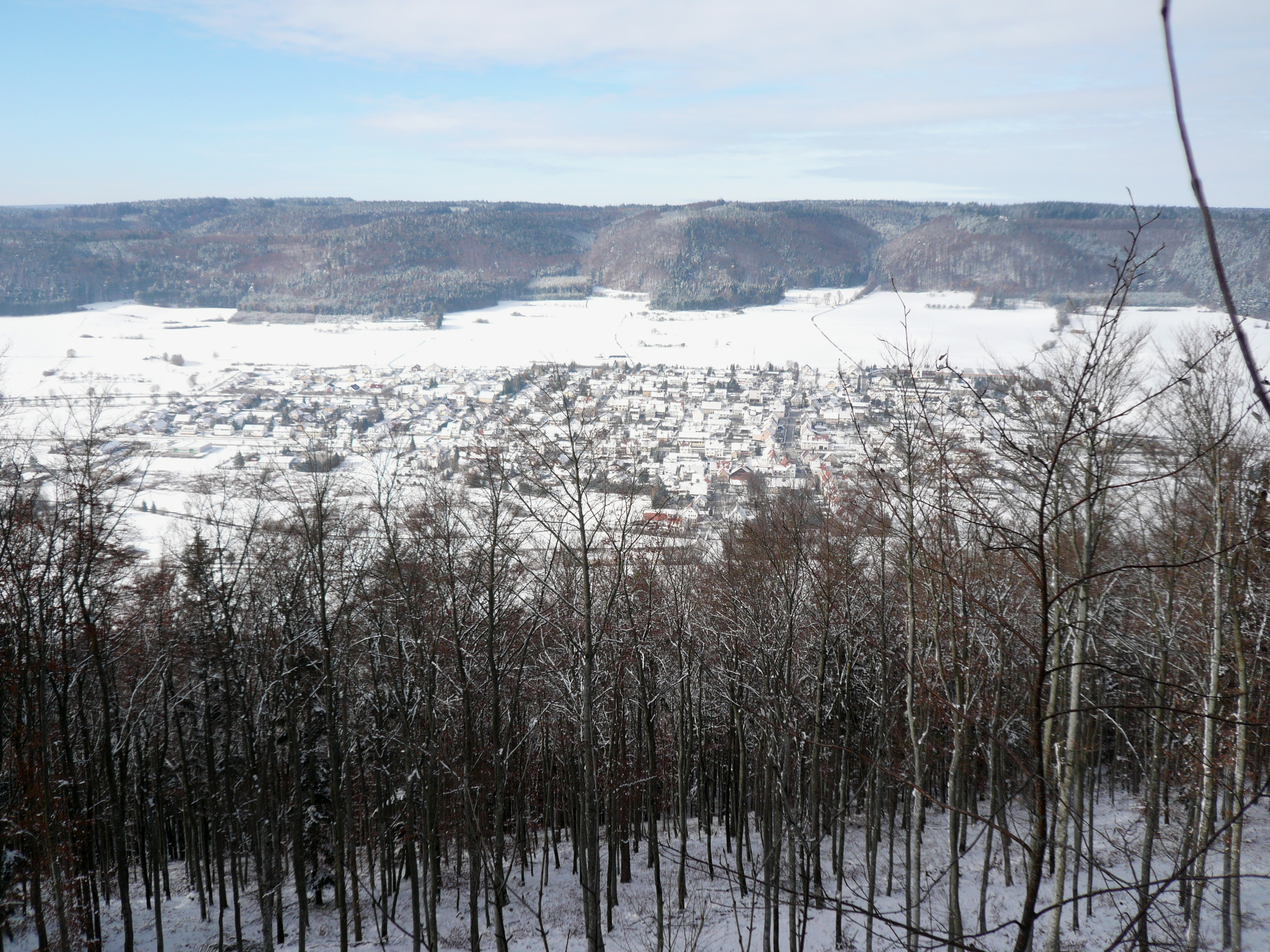 Weilheim near Tuttlingen seen from Schwaebische Alb